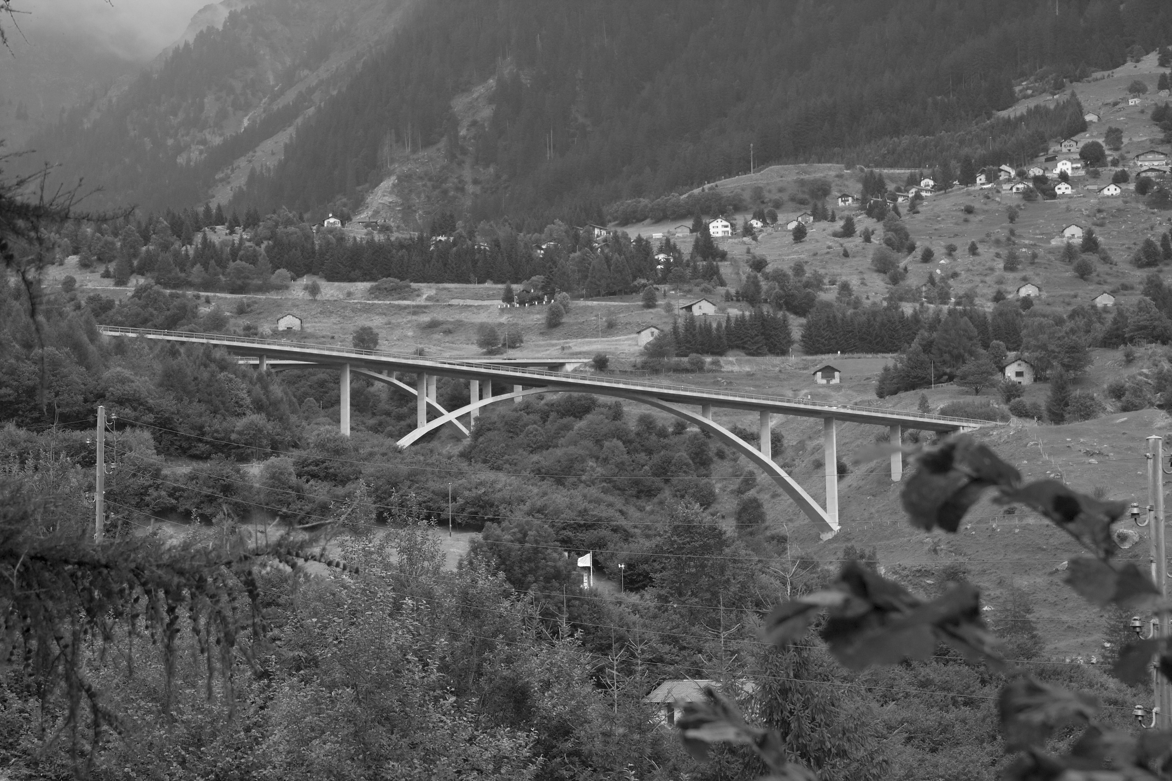 Ponte Nanin (vorne) und Ponte Cascella (hinten) von Christian Menn